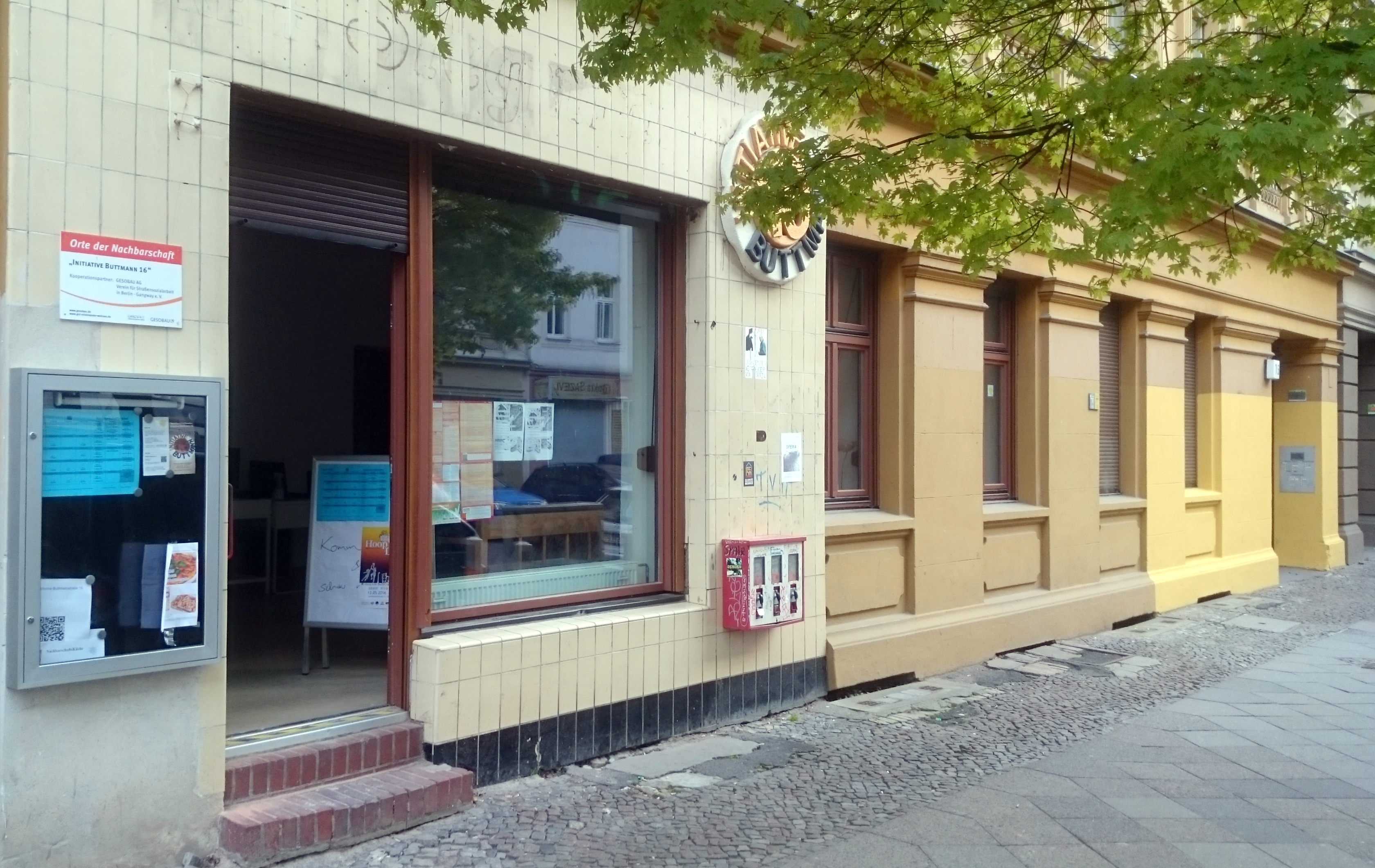 Drittes WikiWedding-Treffen in der Buttmannstraße 16